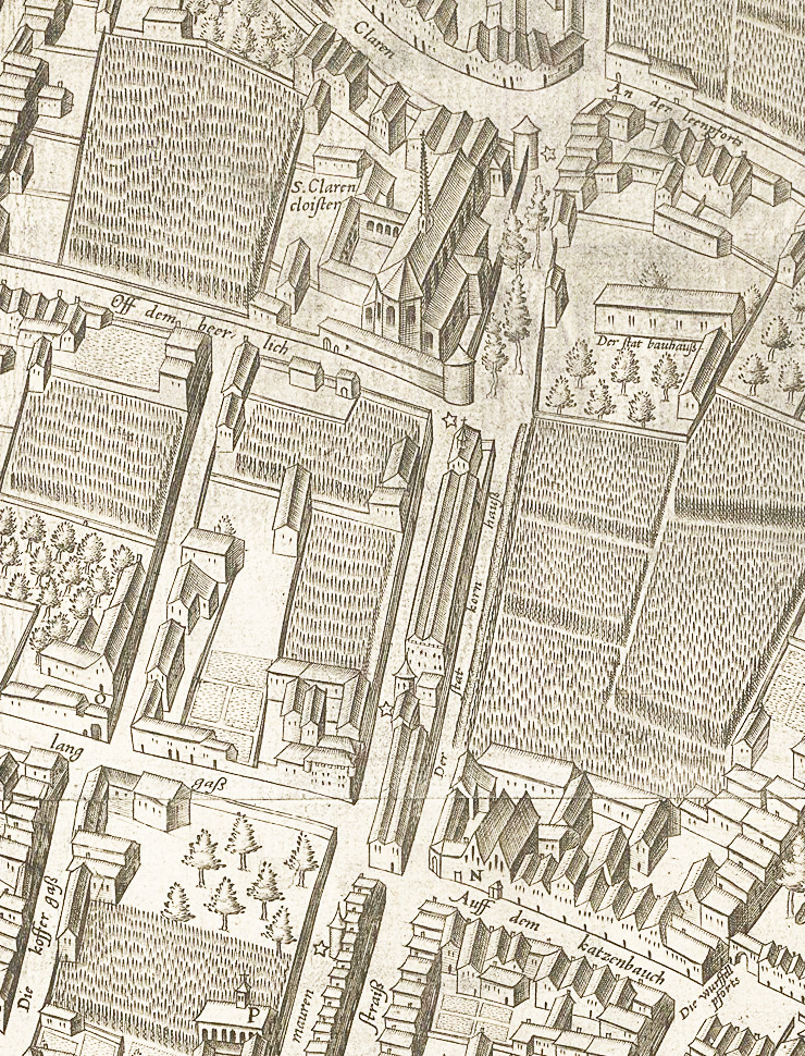 Ausschnitt des Mercator – Stadtplanes Köln. Bereich „Zeughausstraße und Umgeld um 1570/71“